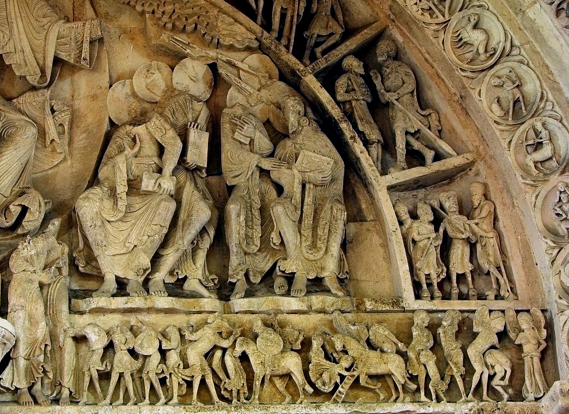 Le tympan central du narthex (sculpté vers 1125-1130),détail: au centre, le Christ en gloire transmet l'Esprit Saint aux apôtres; compartiment du haut, les Byzantins; compartiment du bas, les Arméniens; les médaillons de haut en bas:le Scorpion, un paysan tue un porc, le Sagittaire; sur le linteau, les peuples inconnus: de droite à gauche, les Panotti (aux grandes oreilles), les Pygmées, les Macrobii des Indes (peuple de géants). Basilique Sainte-Marie-Madeleine de Vézelay.